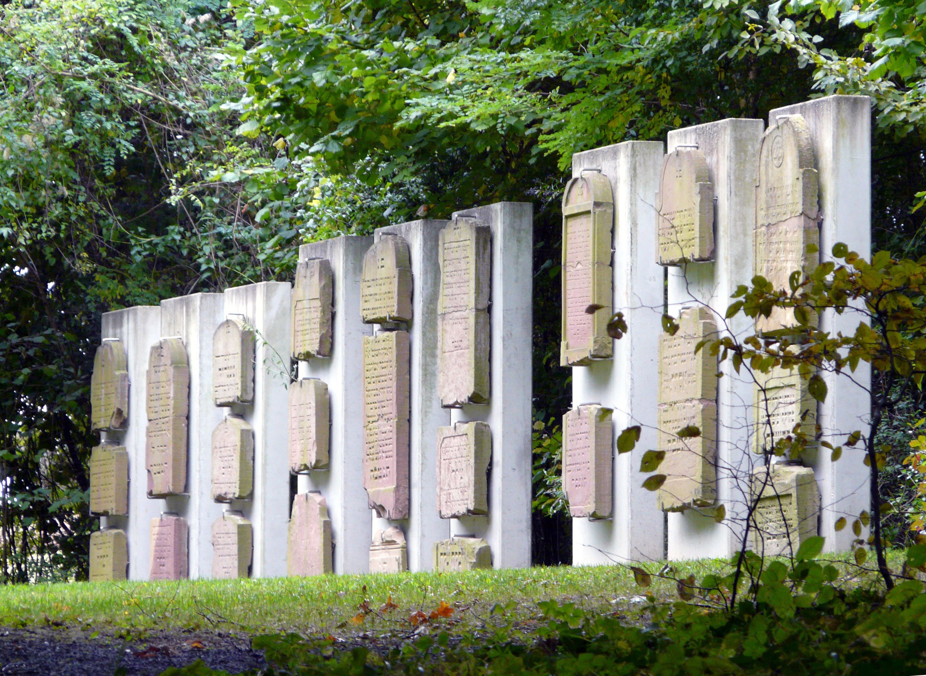 Bildinhalt: Jüdischer Friedhof Obergrombach Aufnahmeort: Bruchsal-Obergrombach, Deutschland